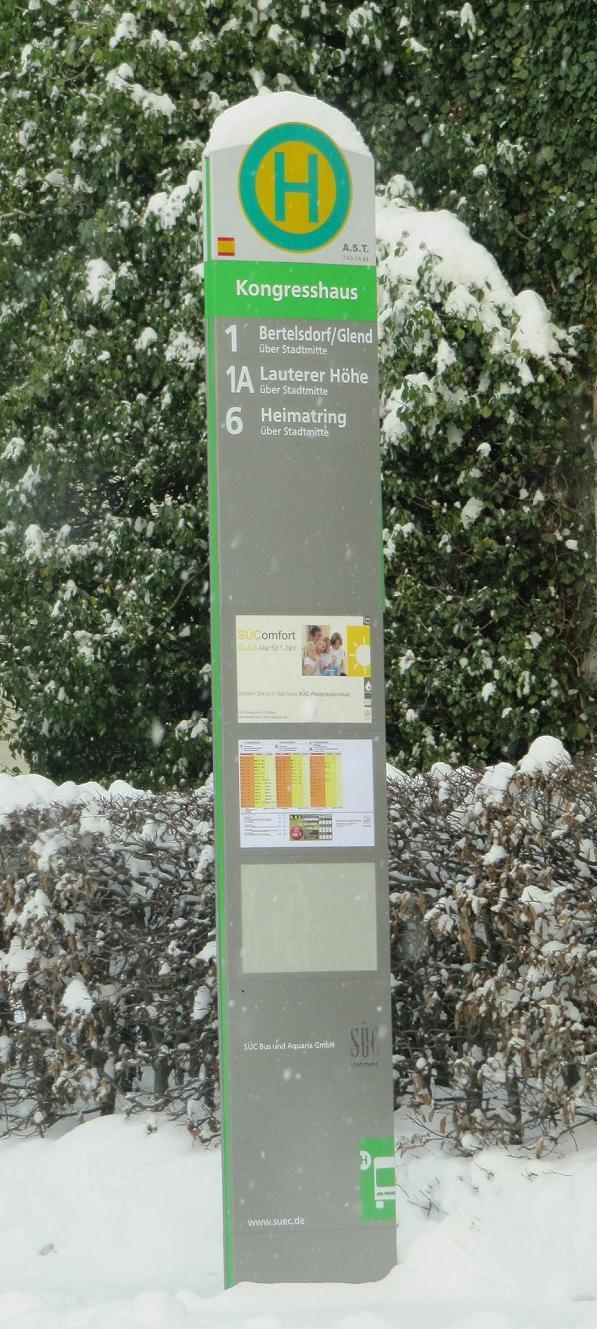 Haltestellenschild an Bushaltestelle